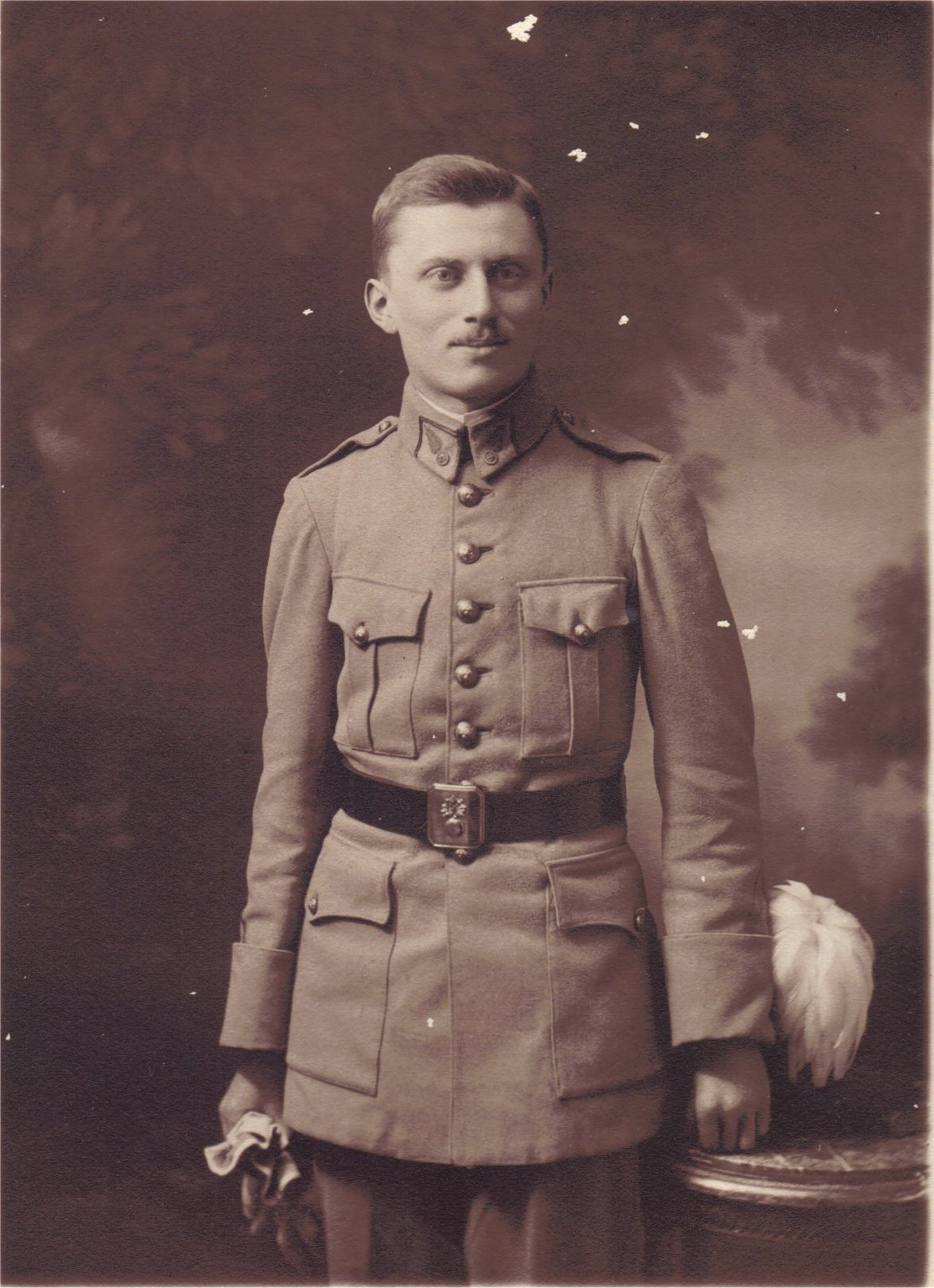 Photo du sous-lieutenant Pierre-Elie Jacquot en 1922 à sa sortie de Saint-Cyr.